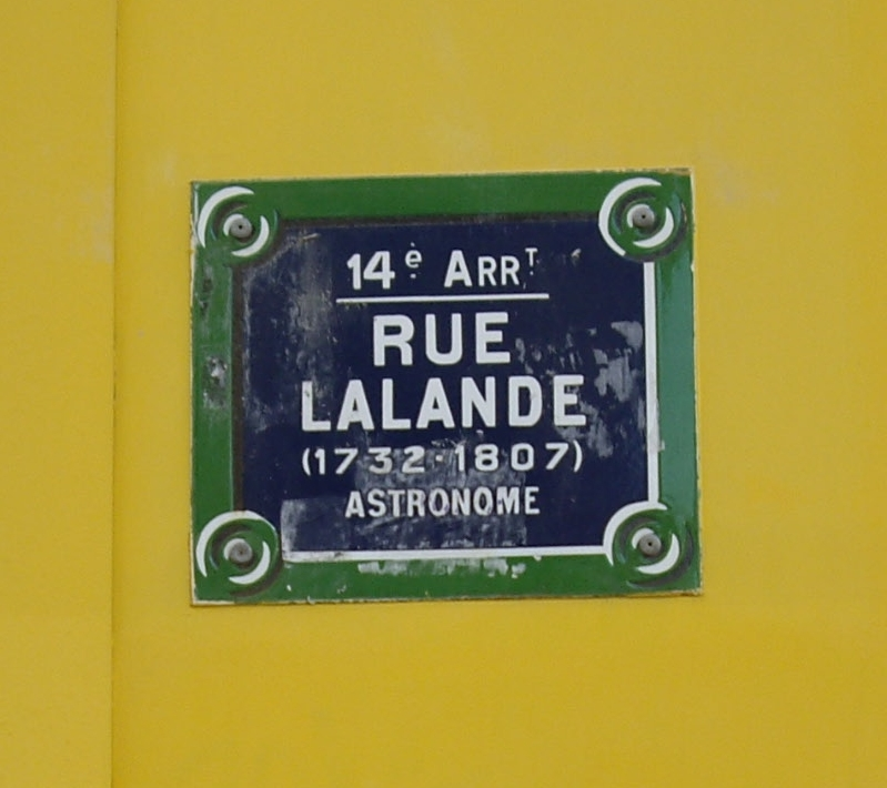 Plaque de la rue Lalande, Paris 14e, en mémoire de l'astronome Joseph Jérôme Lefrançois de Lalande (1732-1807).